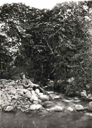 קלוד רנייה קונדר. תמונה משנות ה-70 של המאה ה-19 מאתר הקרן לחקר ארץ ישראל